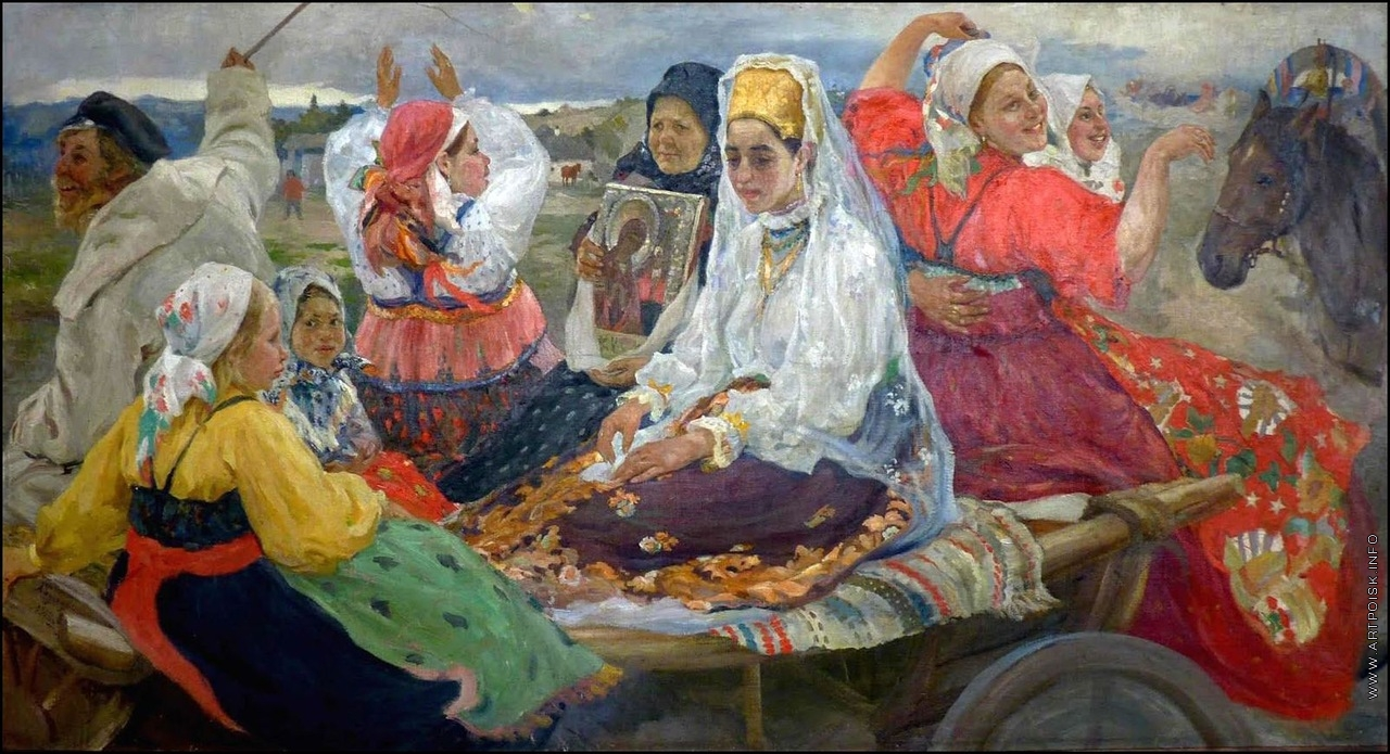 Бучкури А. Название Свадебный поезд Год создания 1913 Материал Холст, масло